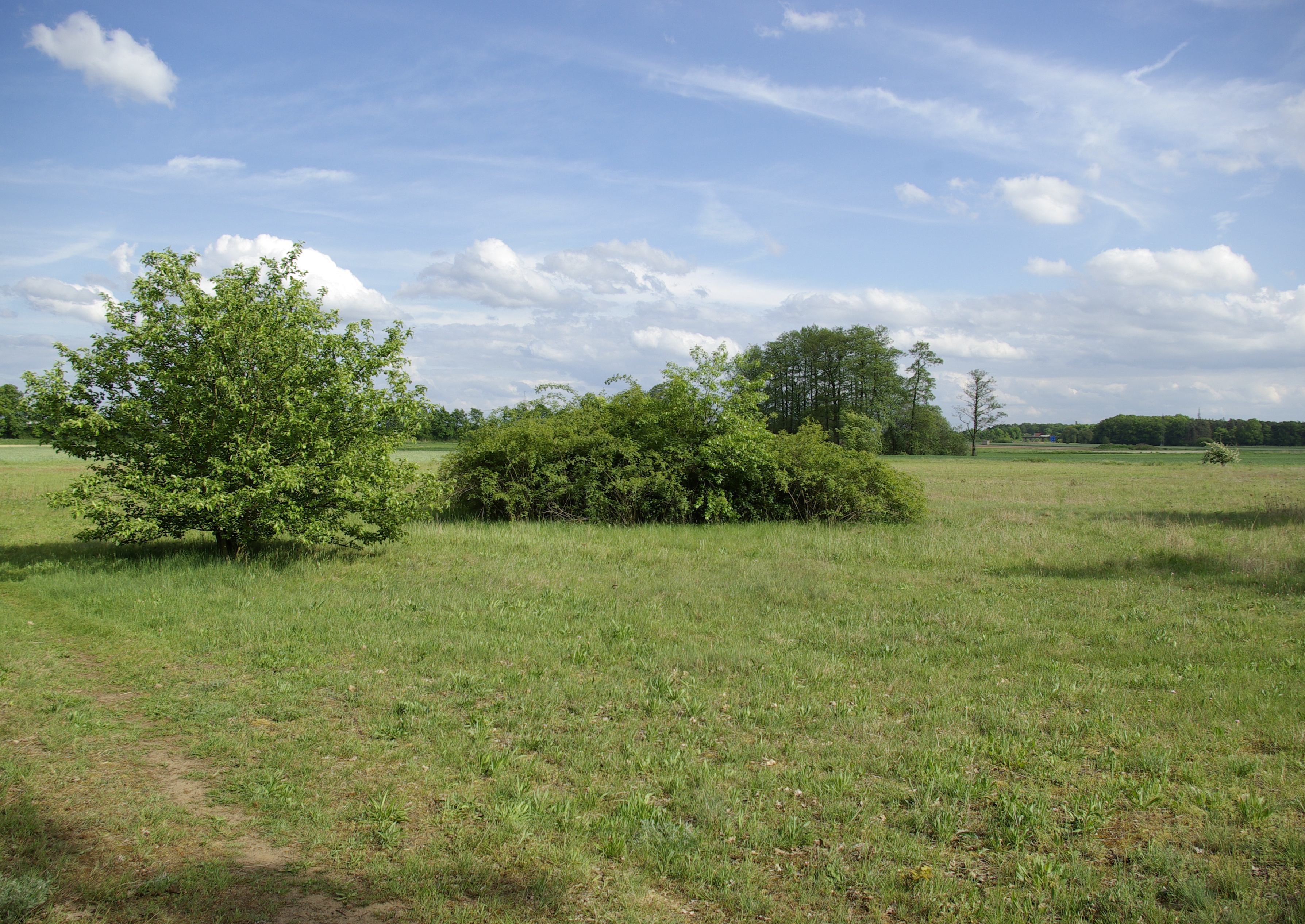 Die Hempeläcker im Fürther Stadtteil Stadeln, Teil des Landschaftsschutzgebietes Am (Bucher) Landgraben und der Sandachse Franken.